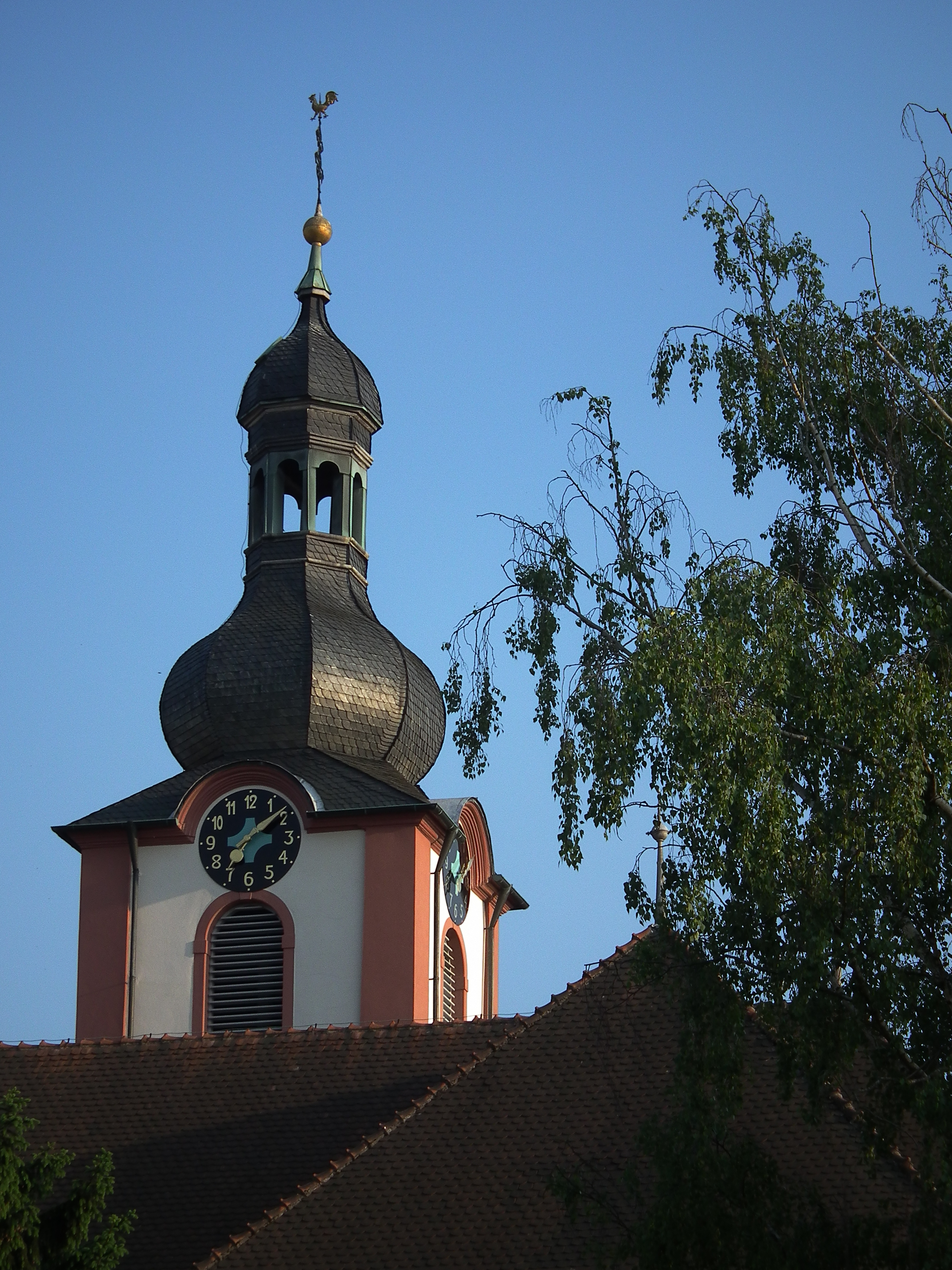 Turm der katholischen St. Laurentius-Kirche in Nußloch (Baden-Württemberg, Deutschland)